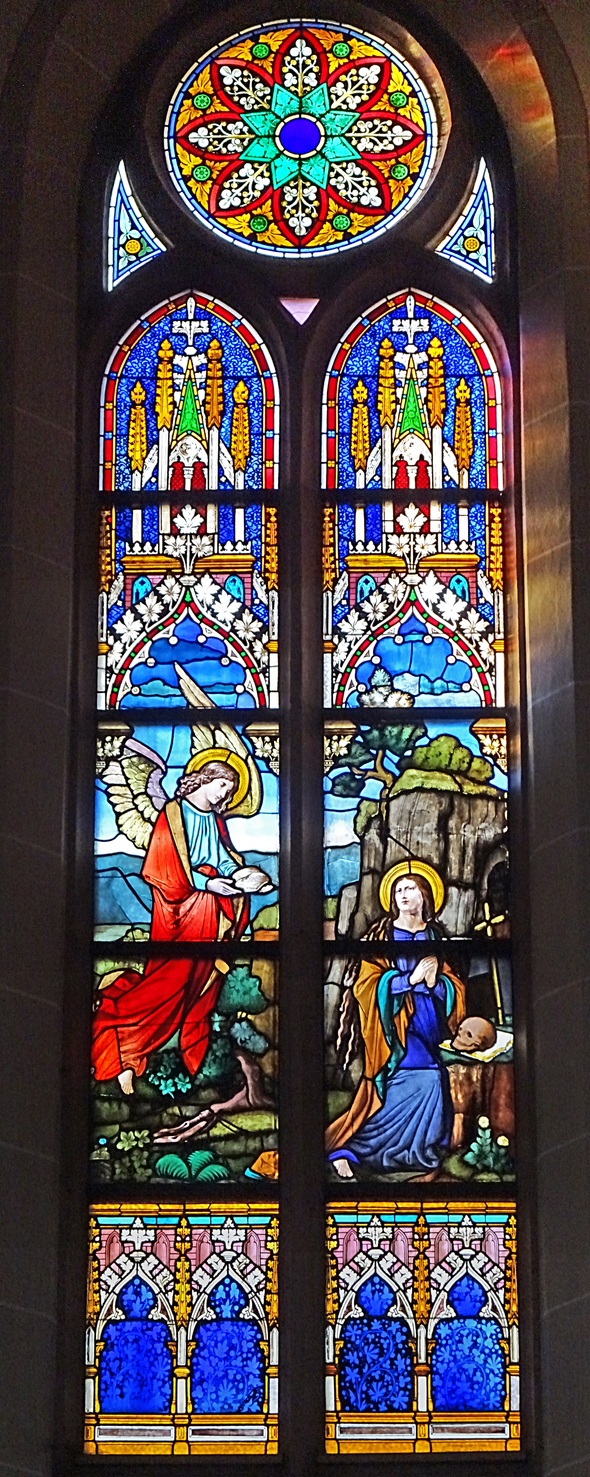 Buntglasfenster im Chor der Pfarrkirche St. Maria Magdalena (Leinefelde)